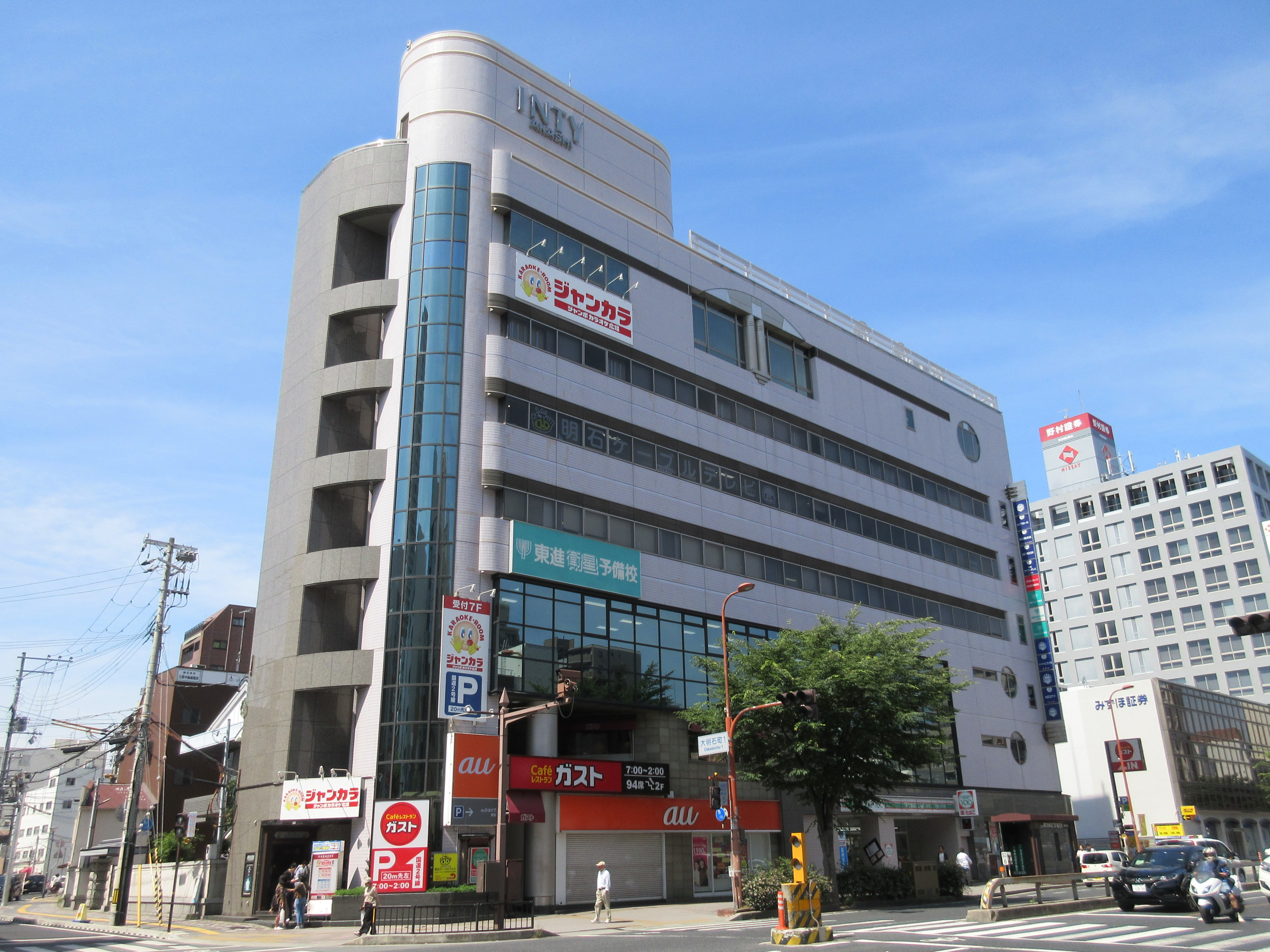 インティ明石ビル